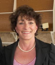 La députée du Var, Josette Pons, lors de la journée oléïcole à la Foire de Brignoles en juin 2007